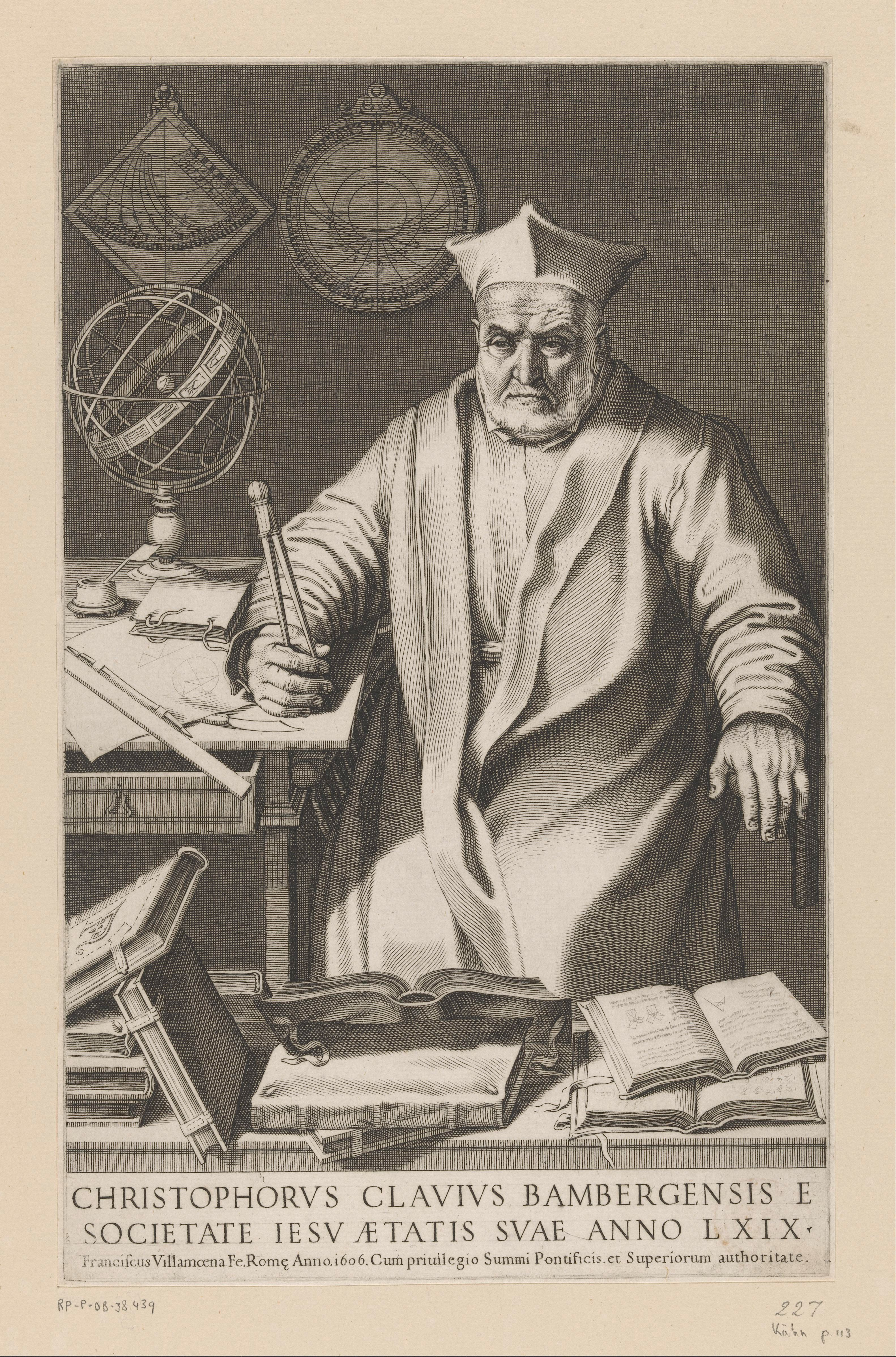 IdentificatieTitel(s): Portret van astronoom Christoph ClaviusObjecttype: prent Objectnummer: RP-P-OB-38.439Catalogusreferentie: LeBlanc 5Opschriften / Merken: verzamelaarsmerk, verso, gestempeld: Lugt 240Omschrijving: De Jezuïet astronoom Christoph Clavius zittend naast een tafel met een passer in de hand. Op tafel staat een astrolabium en aan de muur hangen twee astronomische kaarten. Op de voorgrond liggen dichte en opengeslagen boeken.VervaardigingVervaardiger: prentmaker: Francesco Villamena (vermeld op object)verlener van privilege: Paulus V (vermeld op object)Plaats vervaardiging: prentmaker: Romeverlener van privilege: VaticaanstadDatering: 1606Fysieke kenmerken: gravureMateriaal: papier Techniek: graveren (drukprocedé)Afmetingen: plaatrand: h 343 mm × b 217 mmOnderwerpWat: historical personsastronomical instrumentsdierenriem; de twaalf tekens van de dierenriem bij elkaararmillary sphere, skeleton celestial globeWie: Christoph ClaviusVerwerving en rechtenVerwerving: overdracht van beheer 1816Copyright: Publiek domein